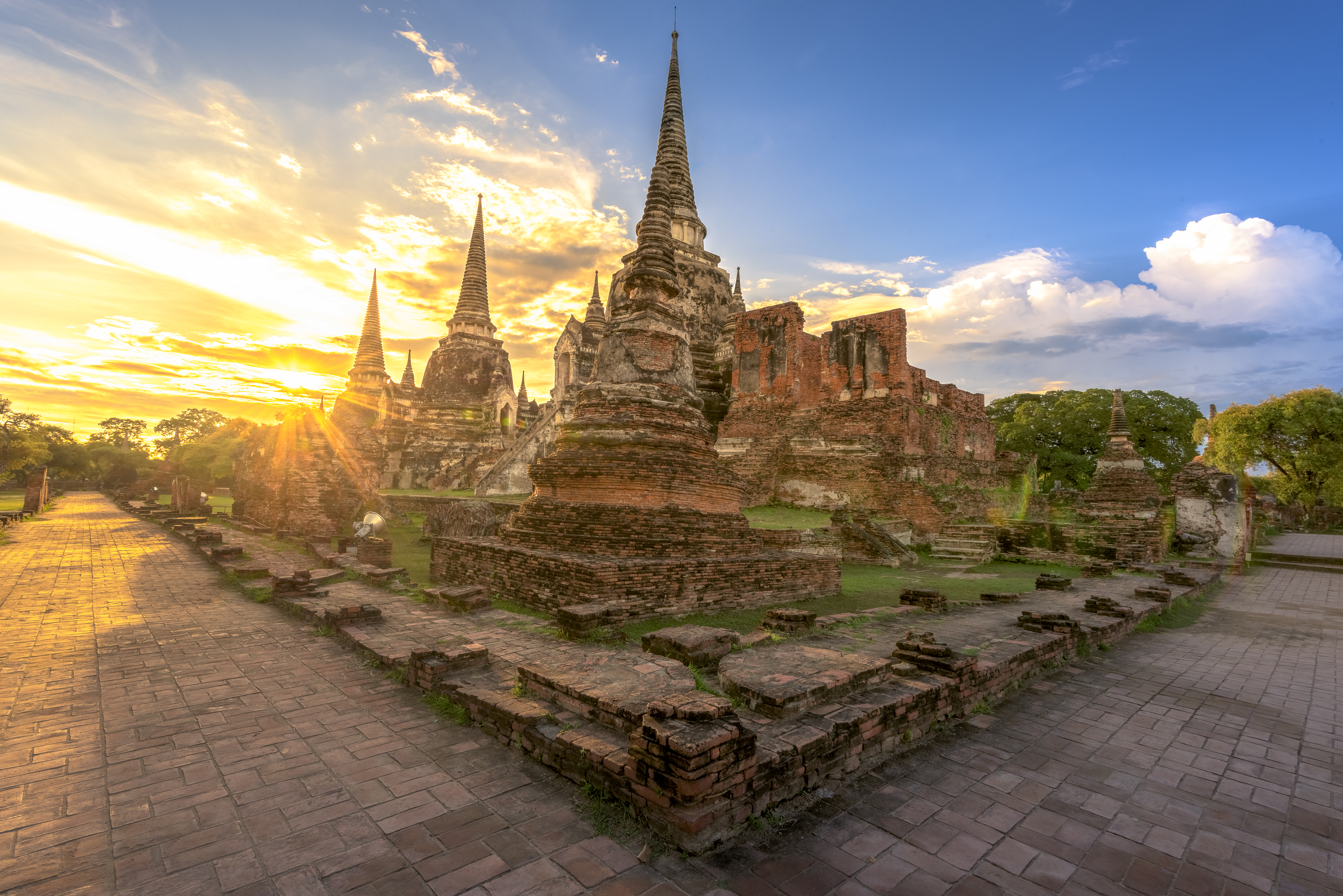 วัดพระศรีสรรเพชญ์